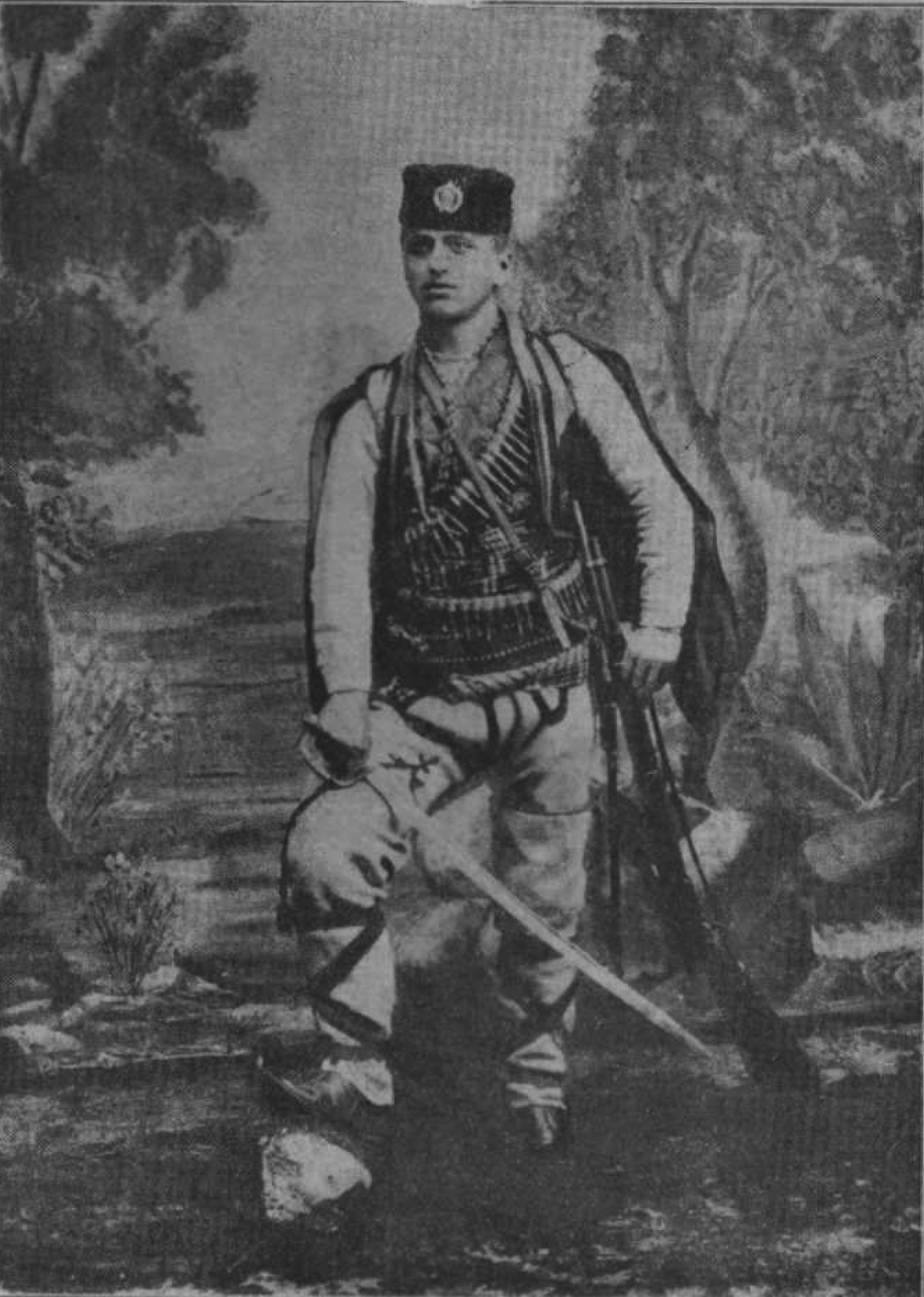 Христо Димитров Кутруля.